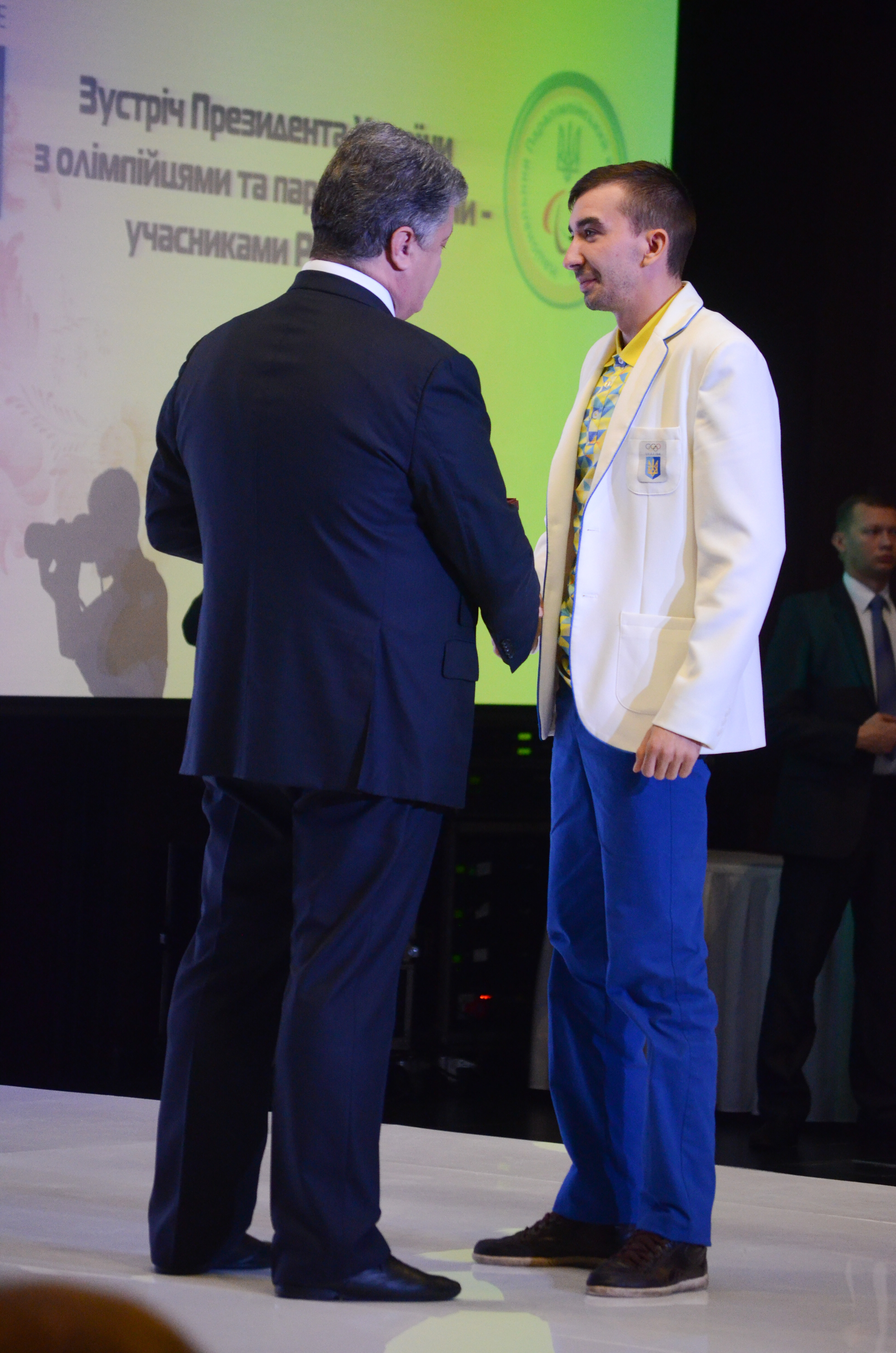 Зустріч Президента України з олімпійцями та паралімпійцями — учасниками Ріо-2016.